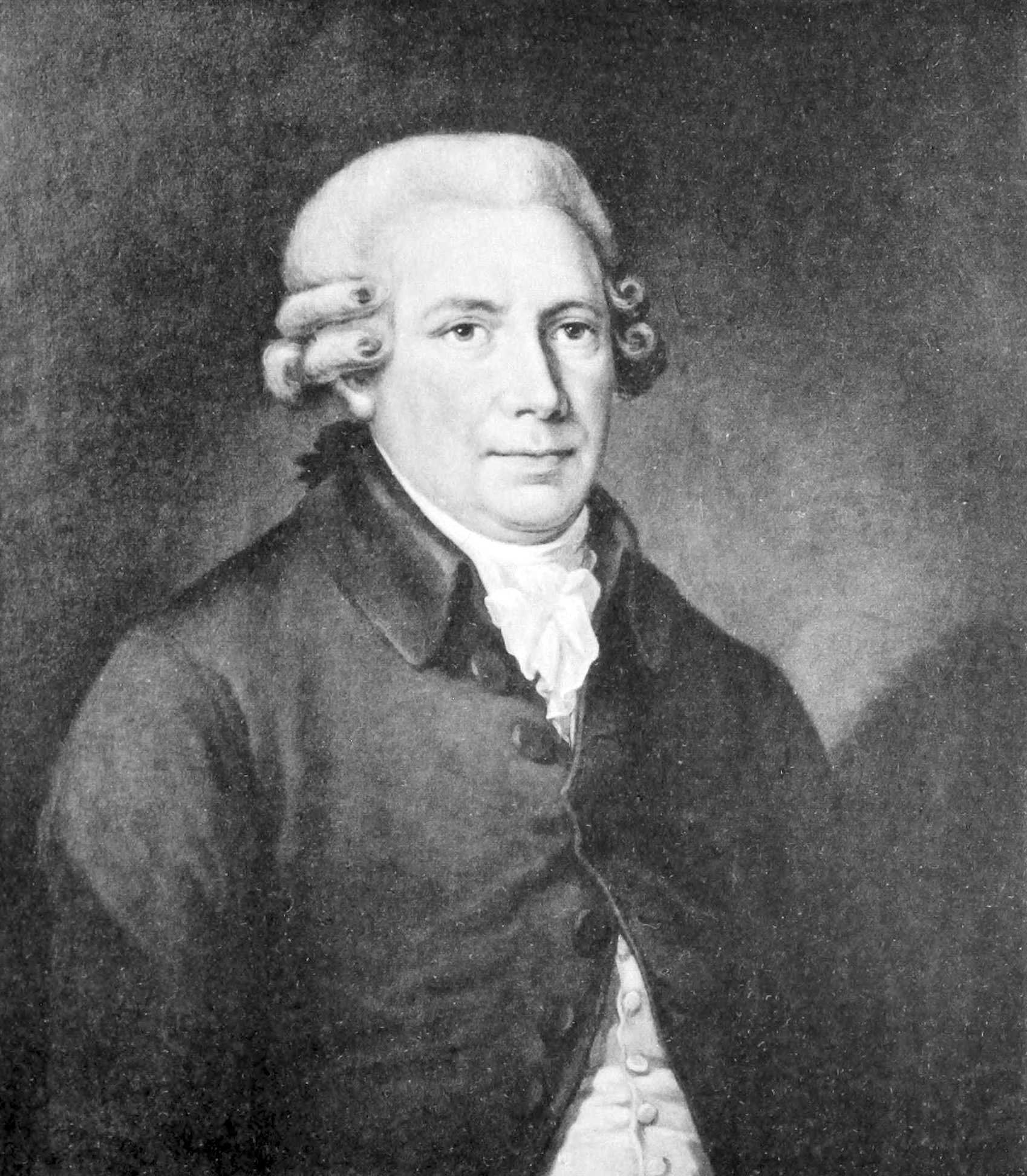 Jonas Sidrén (1723-1799). Medelålders man, bröstbild, fas t. v., med blå ögon, hvit peruk, lindad hvit halsduk, krås. Mörk bakgrund. Olja på duk, 73x64 ctm. Upsala universitet. Sbg. s. 66.